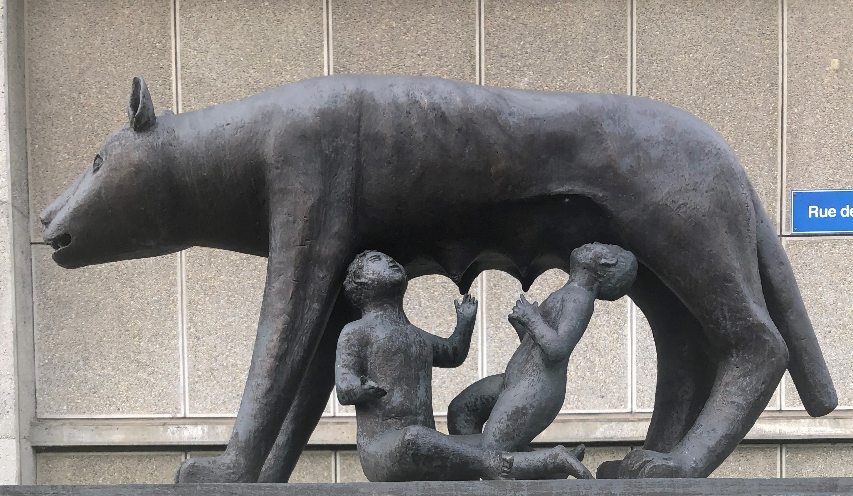 Universität Freiburg (Schweiz): Romulus und Remus (Geschenk an die Uni)